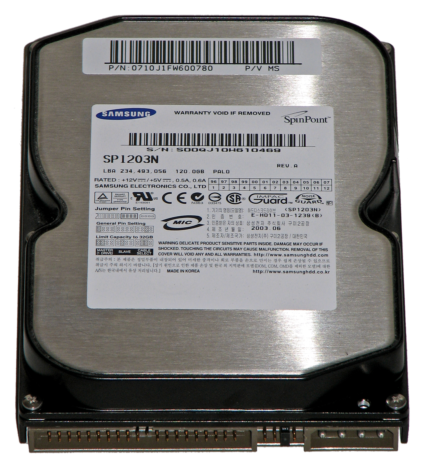 Dieses Bild zeigt eine IDE-Festplatte (Samsung SP1203N - 7200 U/Min - 120 GB).